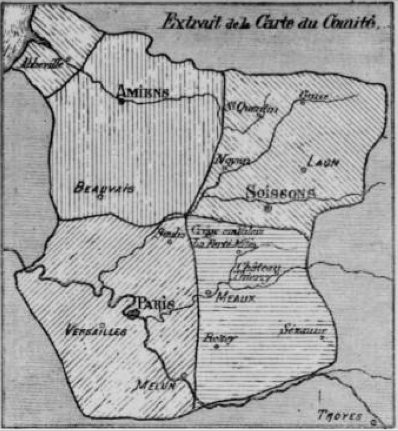 Partage de la Picardie et de l'Ile de France - Comité de Constitution du 29 septembre 1789